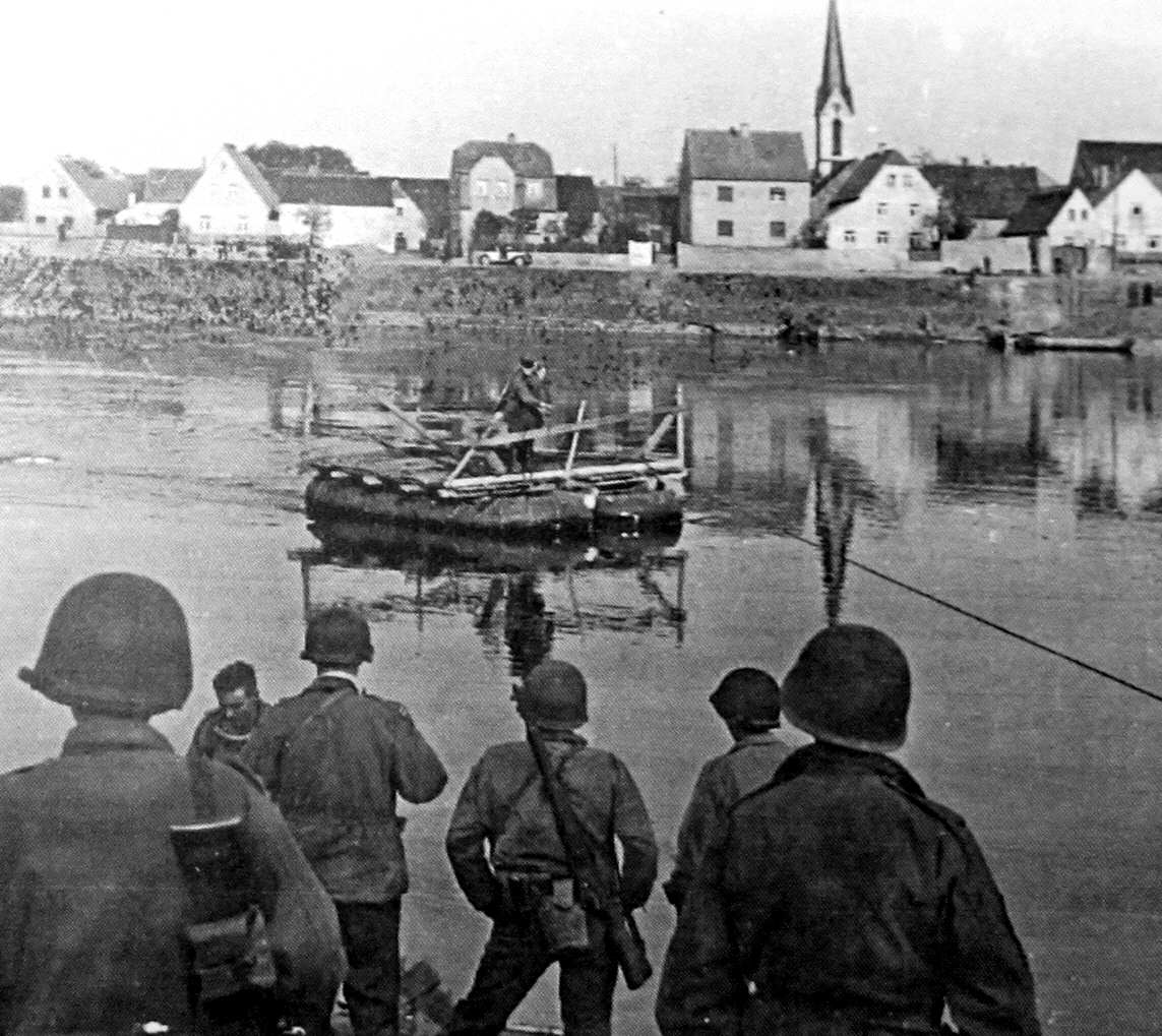 fist Lt. Kotzebue and his patrol at river Elbe Görzig/Kreinitz